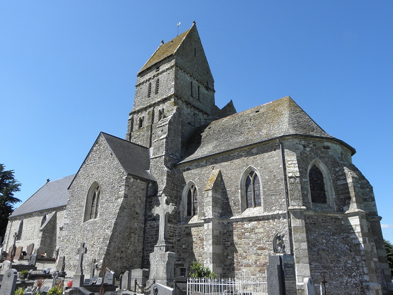 Chevte de l'église Sainte-Hélène à Orval (50) .